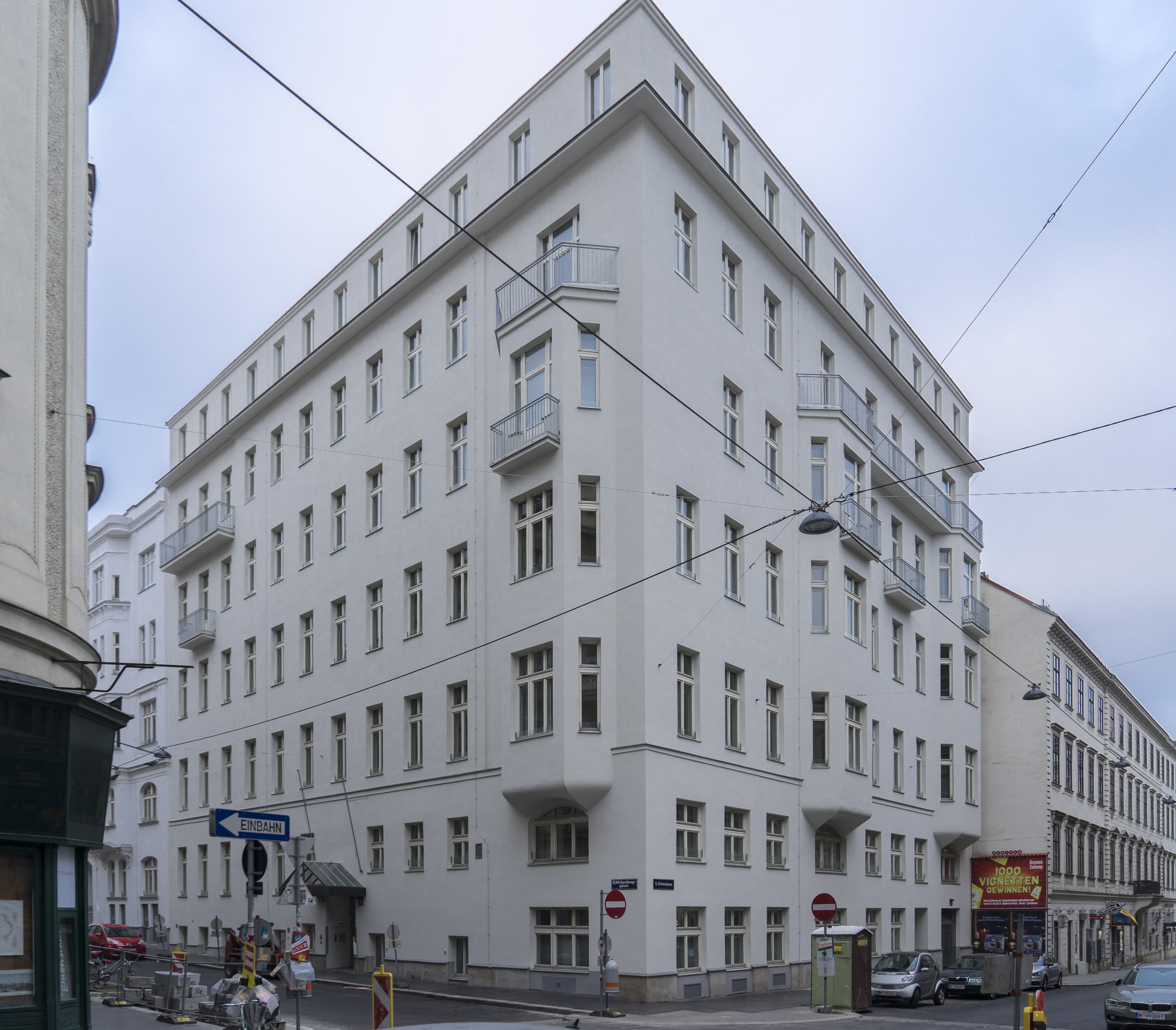 Wohn- u. Bürohaus. Wohnhaus Florianigasse 4